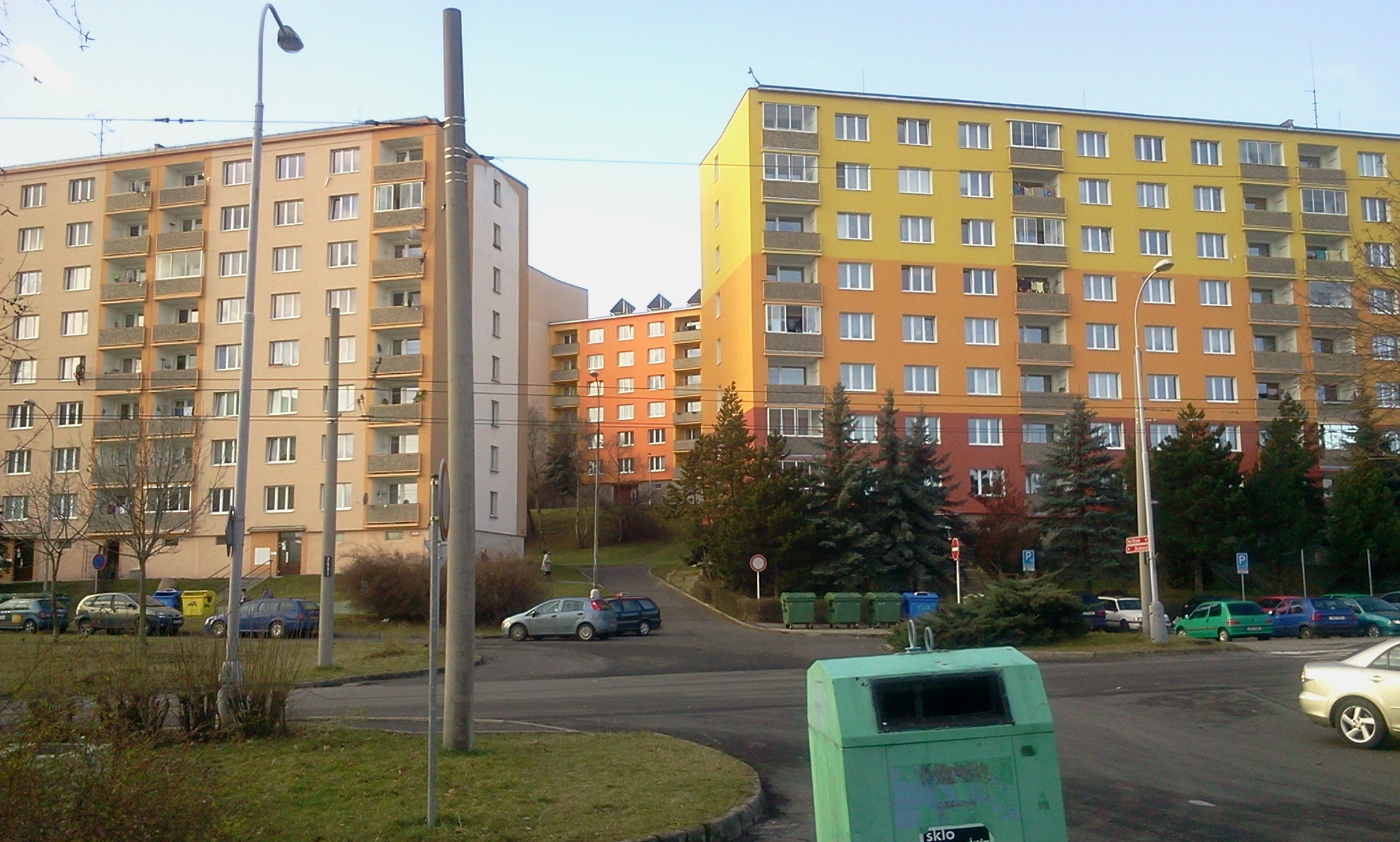 Chomutov, Czech Republic